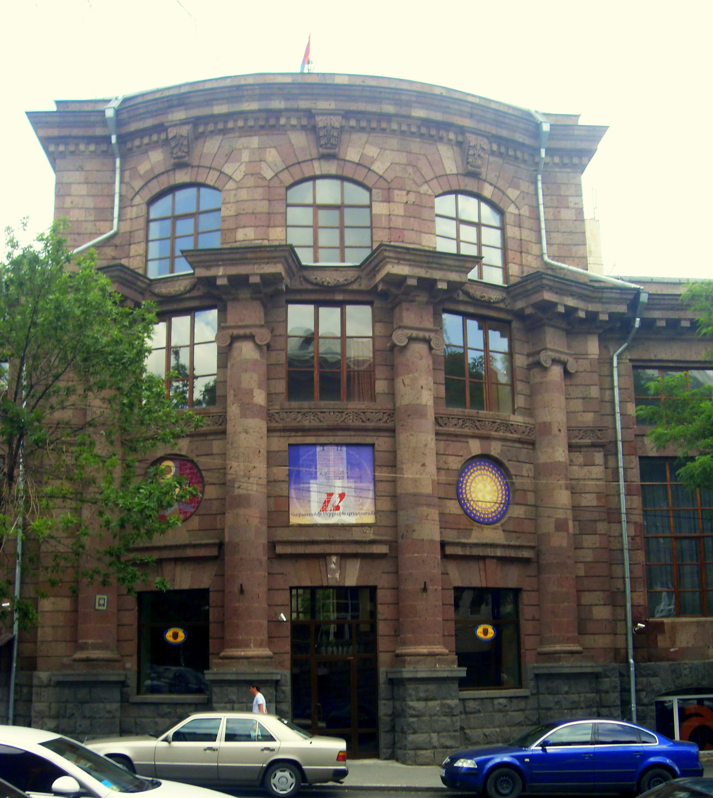 Գրադարանի շենք. Ազգային գրադարանի գլխավոր մասնաշենքը, 1928-1940 թթ., ճարտ.` Ալ. Թամանյան 6/66